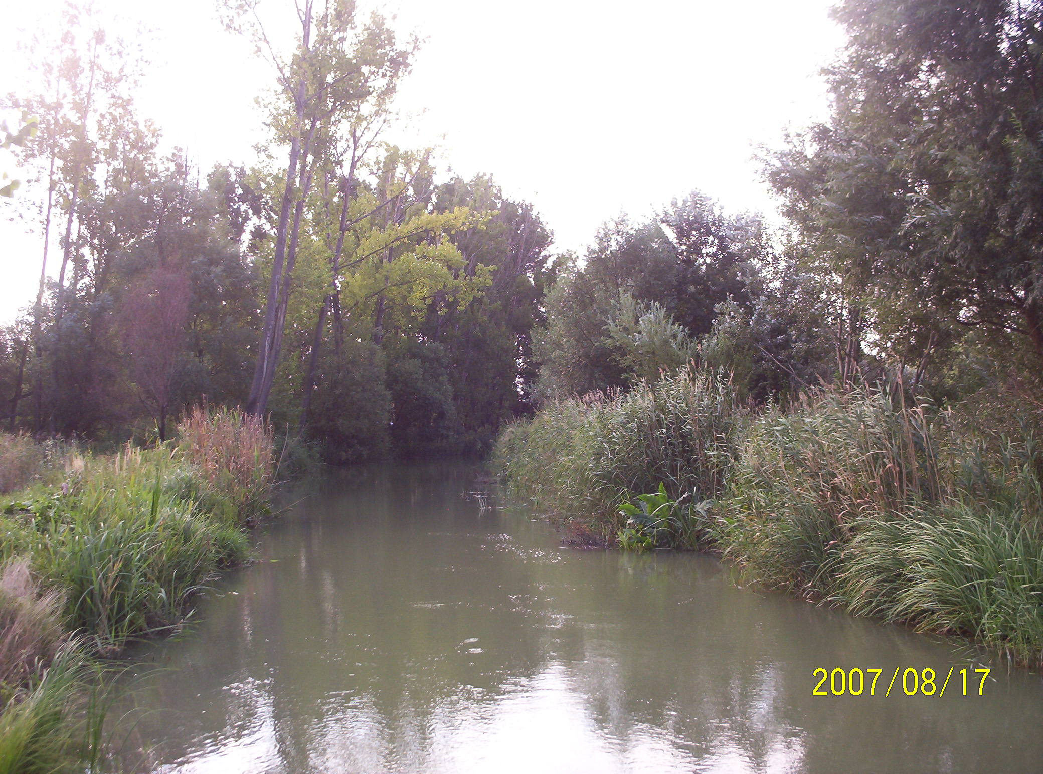 Ártéri füzes Ásványrárónál